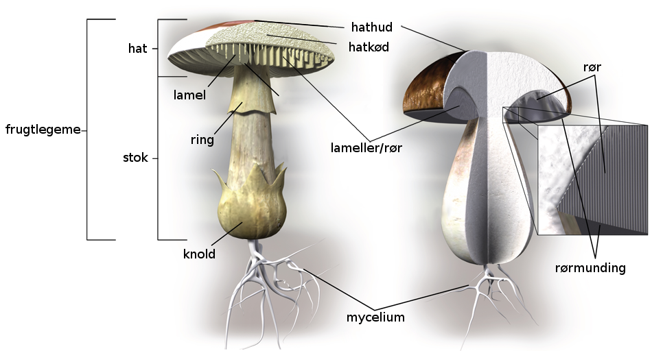 Skitse af lamelsvamp og rørhat